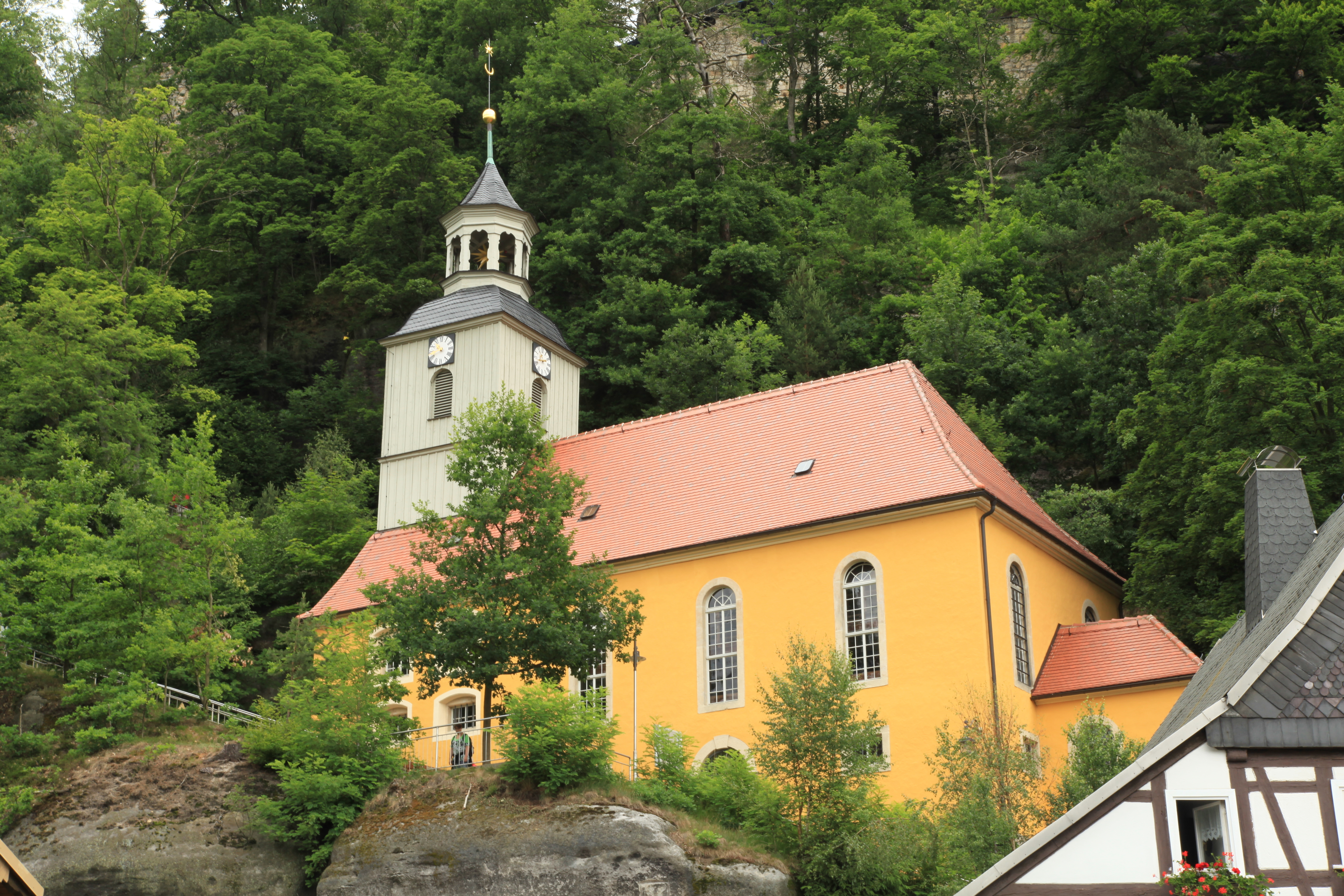 Bergkirche an der Hauptstraße in Oybin